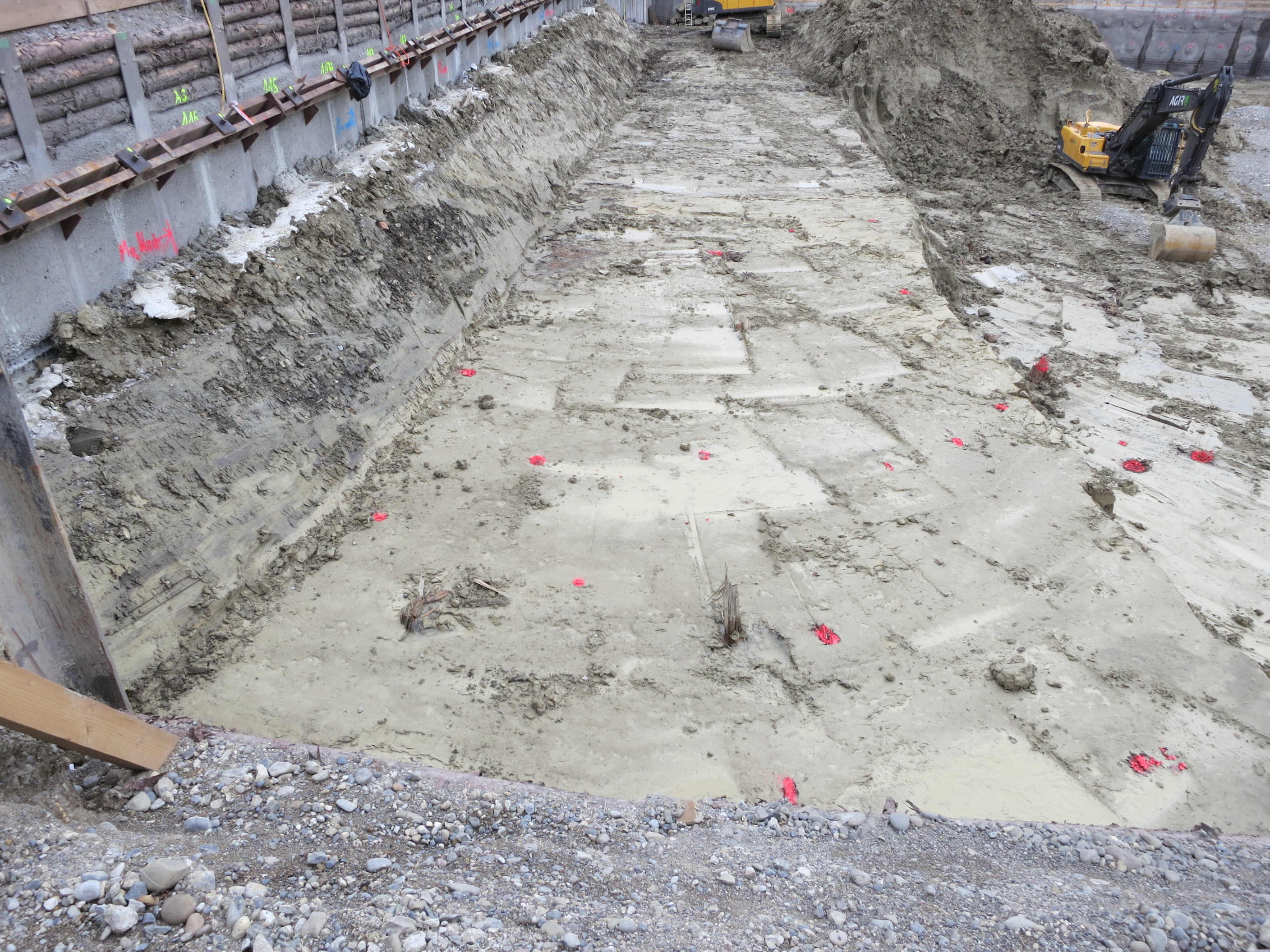 Urzeitwald Binz, Zürich-Wiedikon, Schweiz